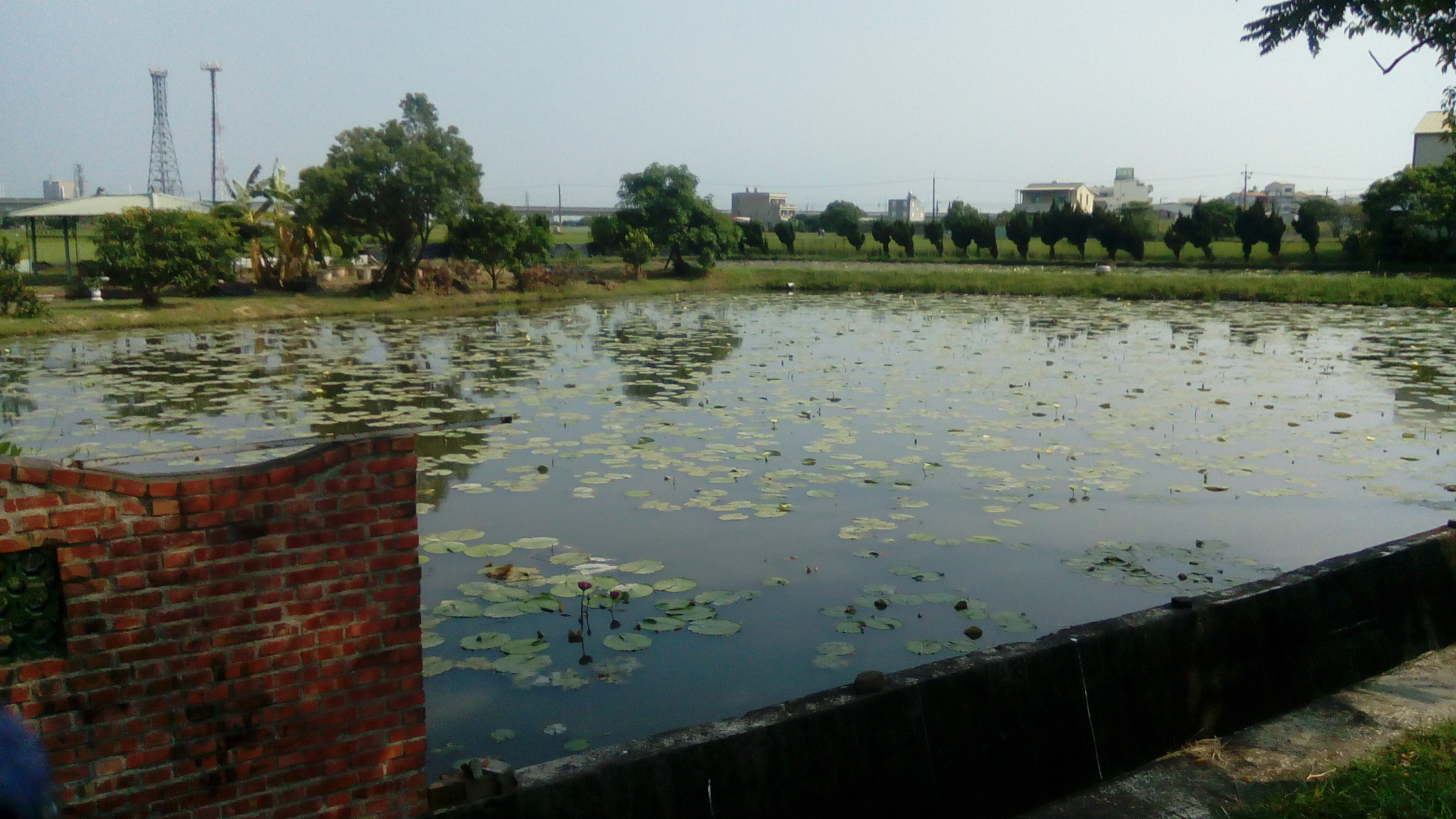 台一線旁 位於官田區南篰